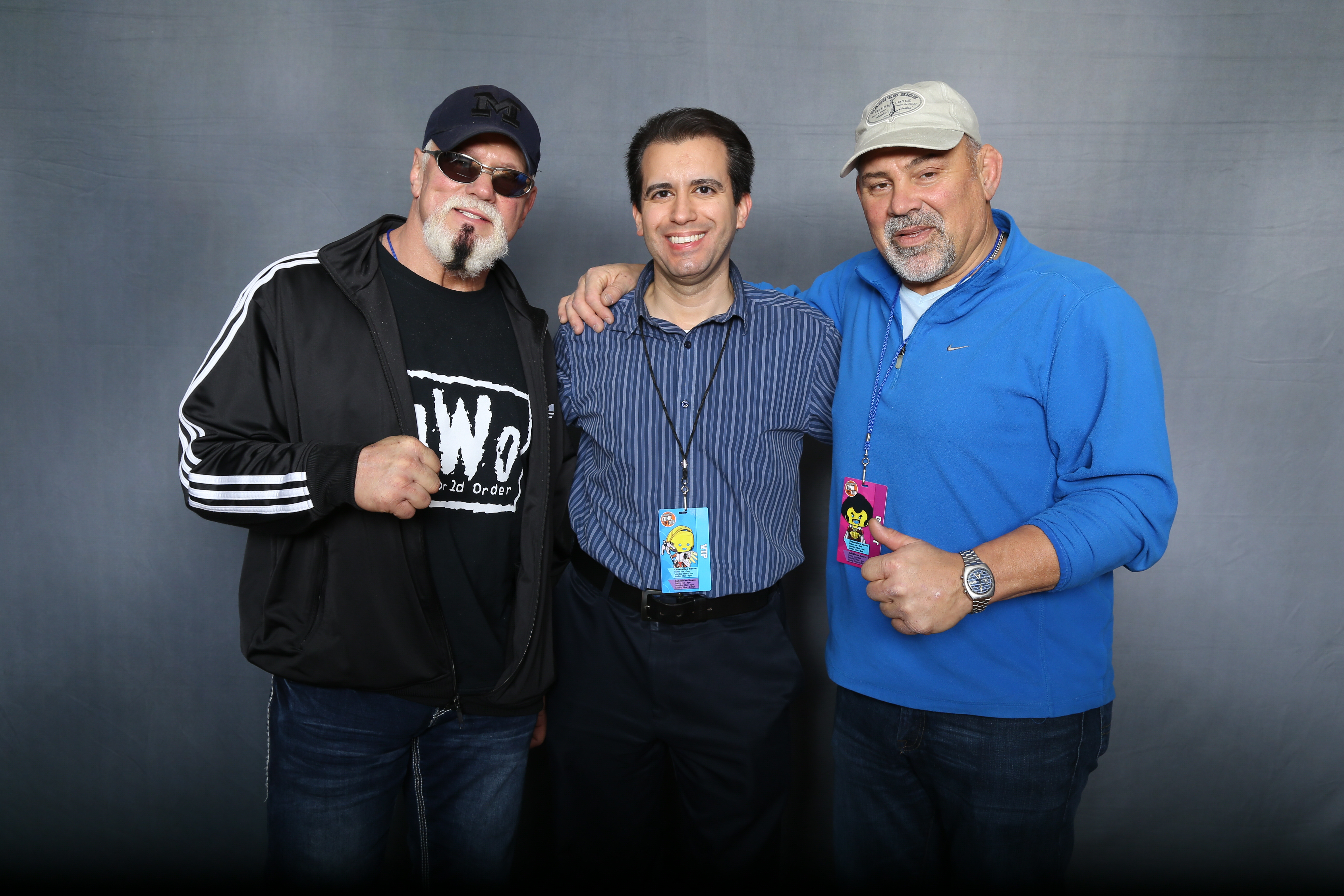 Scott Steiner (à gauche), un fan de catch et Rick Steiner.